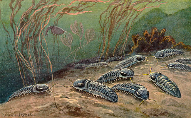 Trilobite